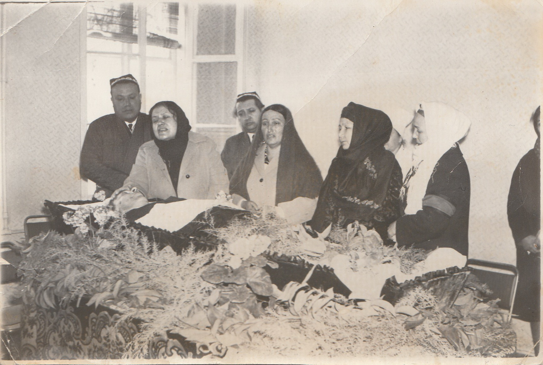 Oʻzbekcha/ўзбекча: Bogoutdinov A.M.ning dafn etish marosimidan , 1970-yil ( ukasi Bogoutdinov S. (chapdan birinchi) ,opasi Bogoutdinova M. (chapdan ikkinchi)